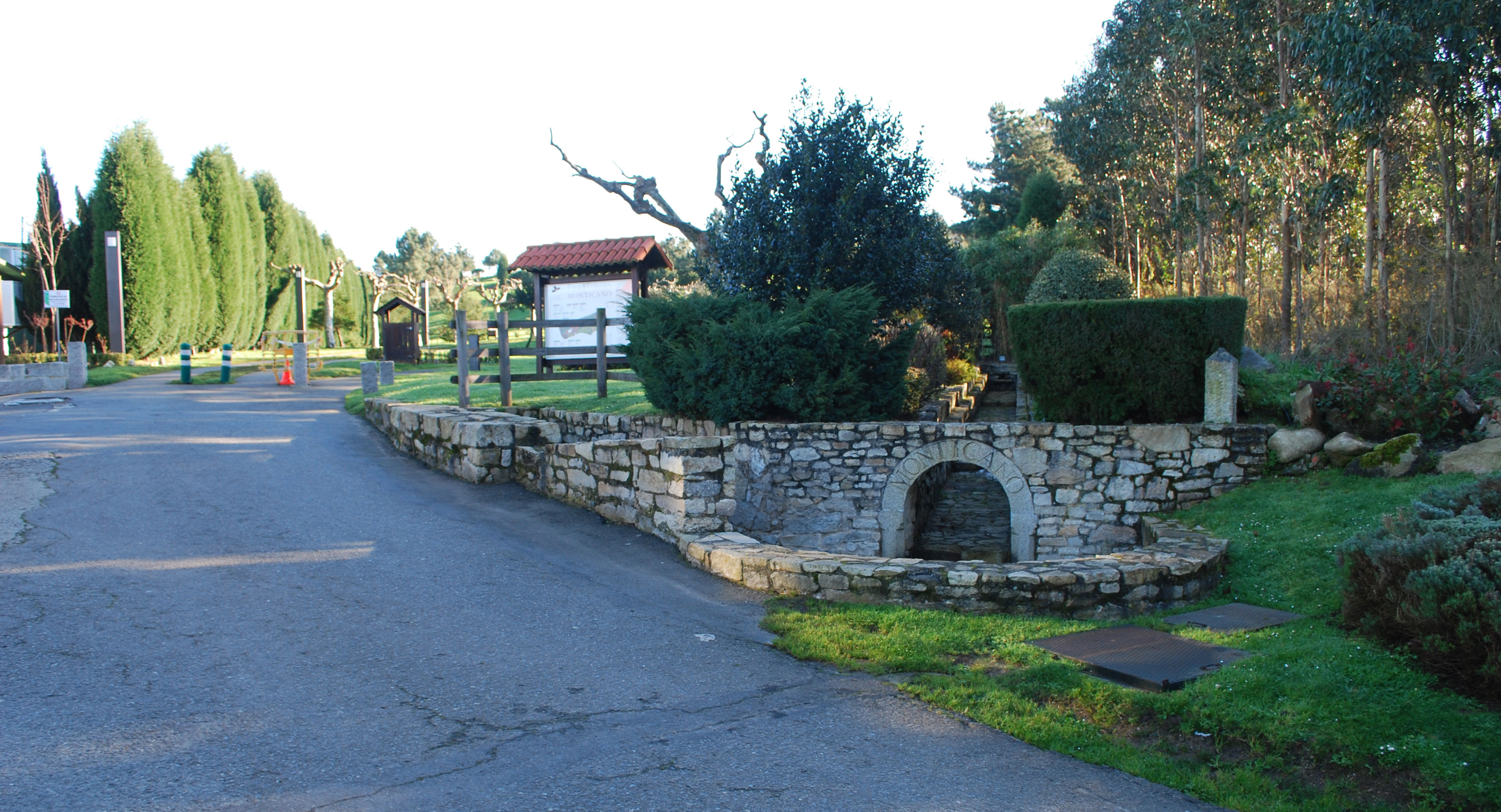 Vista do Monticaño en A Pastoriza Arteixo A Coruña Galiza Spain